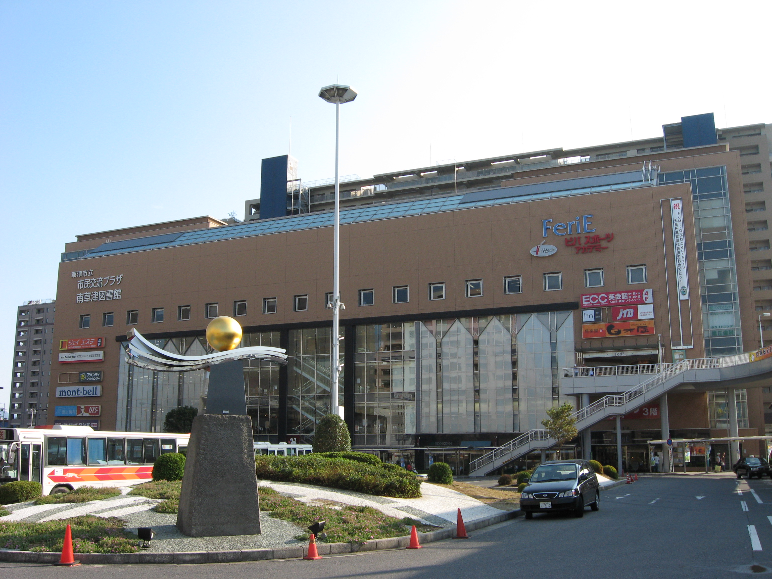 FeriE Minami-Kusatsu